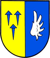 Wappen der Gemeinde Kalsdorf bei Graz in Österreich